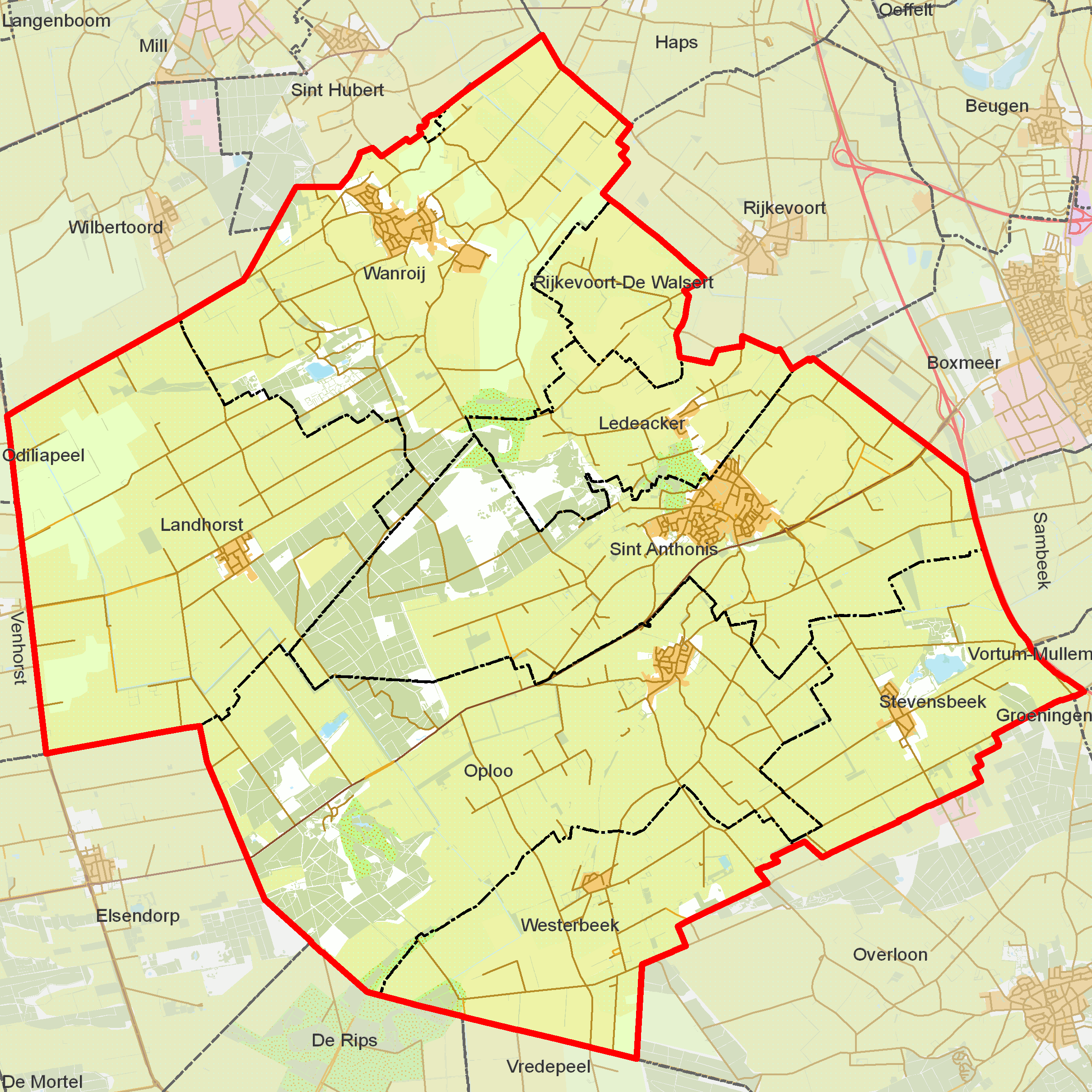 BAG woonplaatsen - Gemeente Sint Anthonis.png